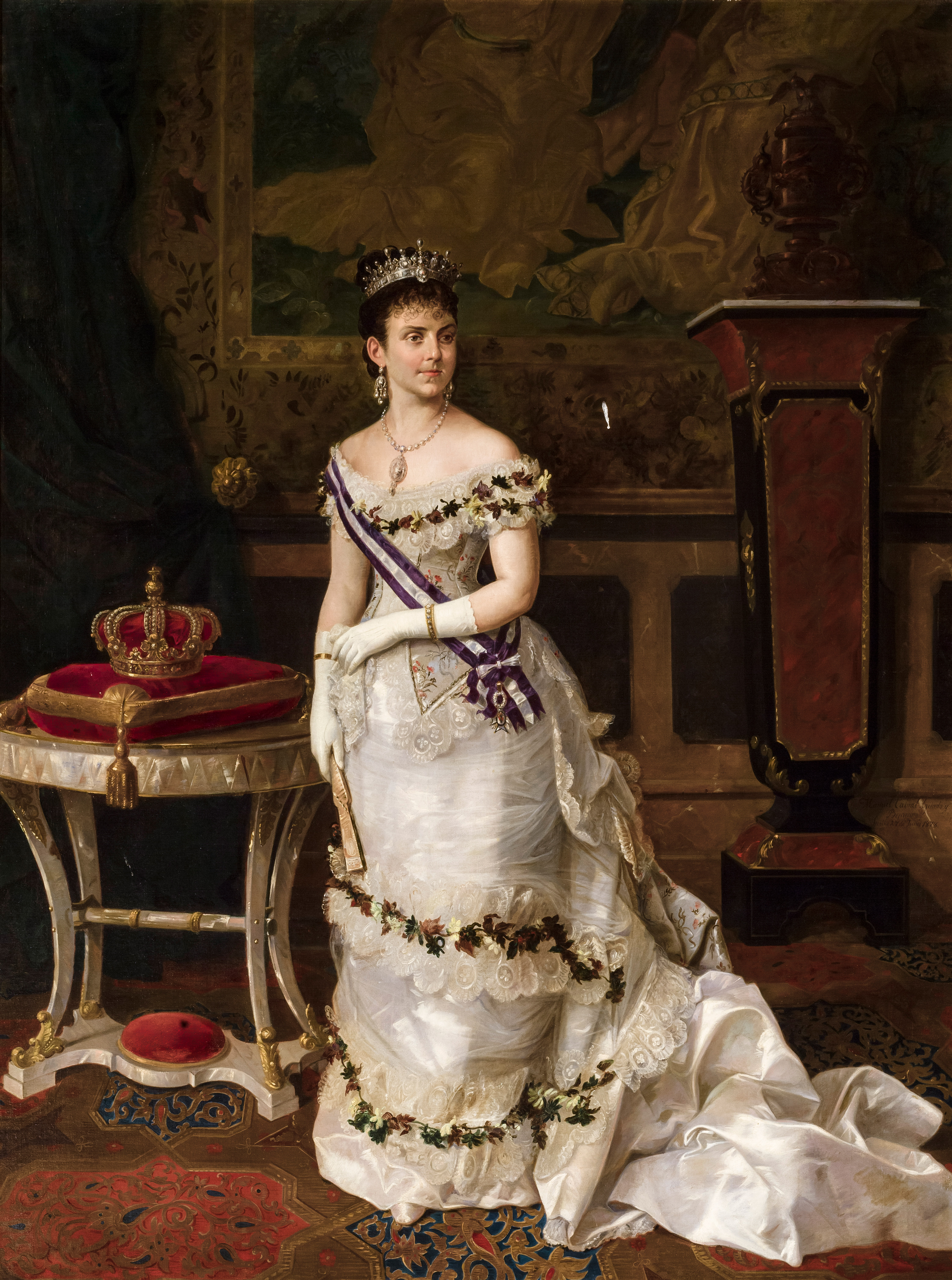 Retrato de María de las Mercedes de Orleans (1860-1878), que fue reina consorte de España por su matrimonio con su primo, el rey Alfonso XII de España, y era hija de Antonio de Orleans, duque de Montpensier, y de la infanta Luisa Fernanda de Borbón.